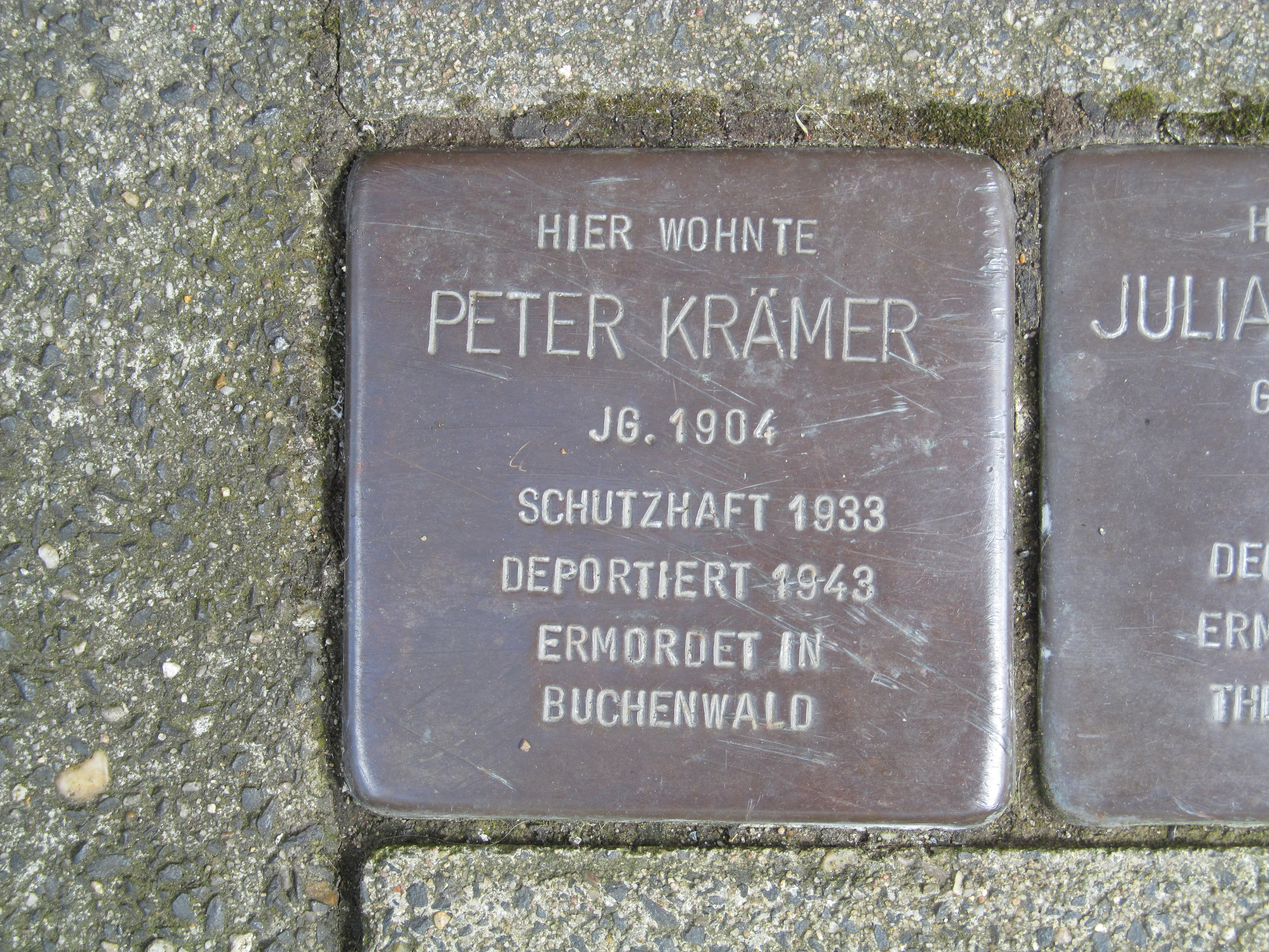 der Stolperstein für Peter Krämer vor dem Haus Poststraße 75 in Duisburg-Hochheide